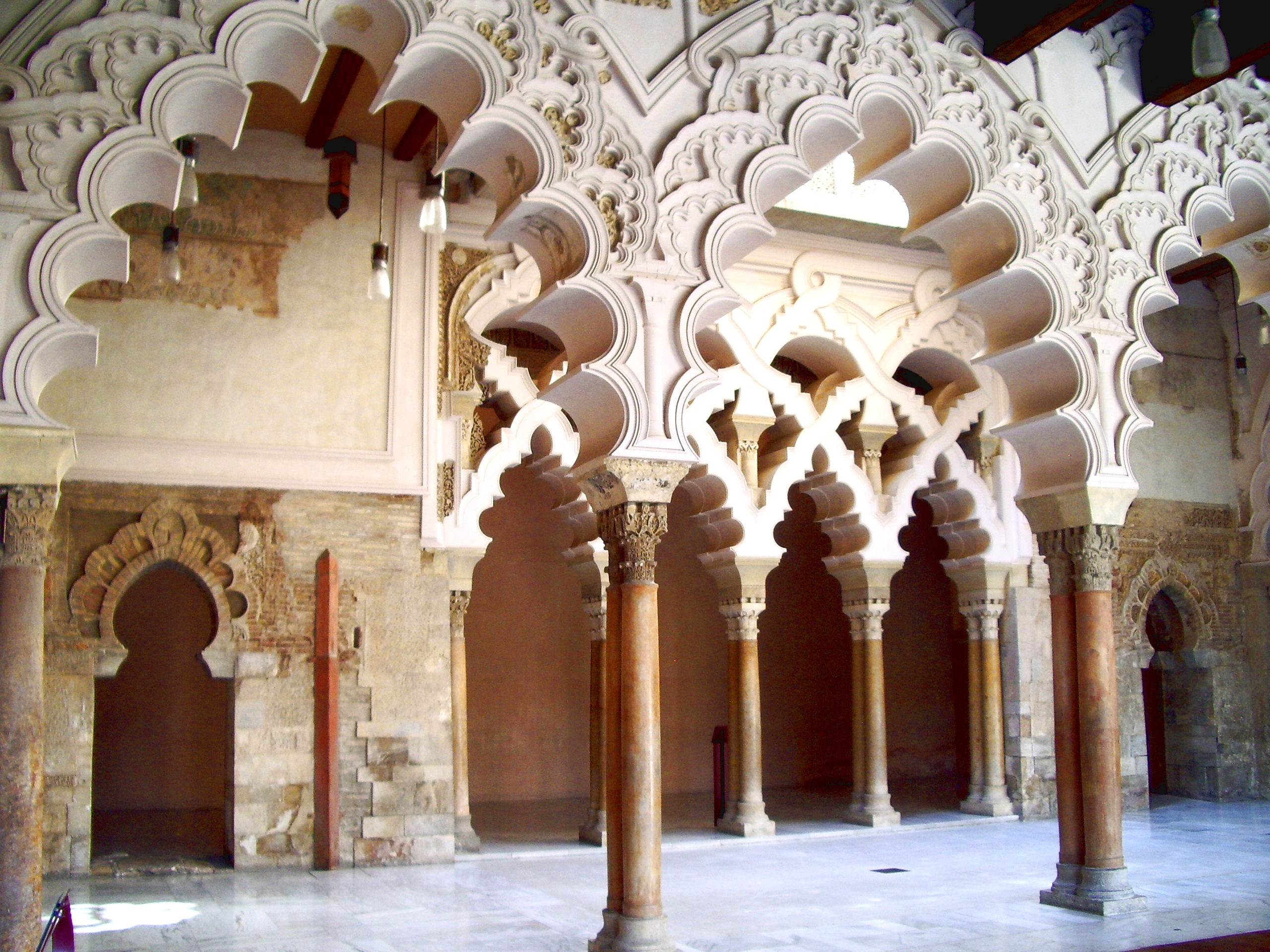 Testero norte 4 de la Aljafería